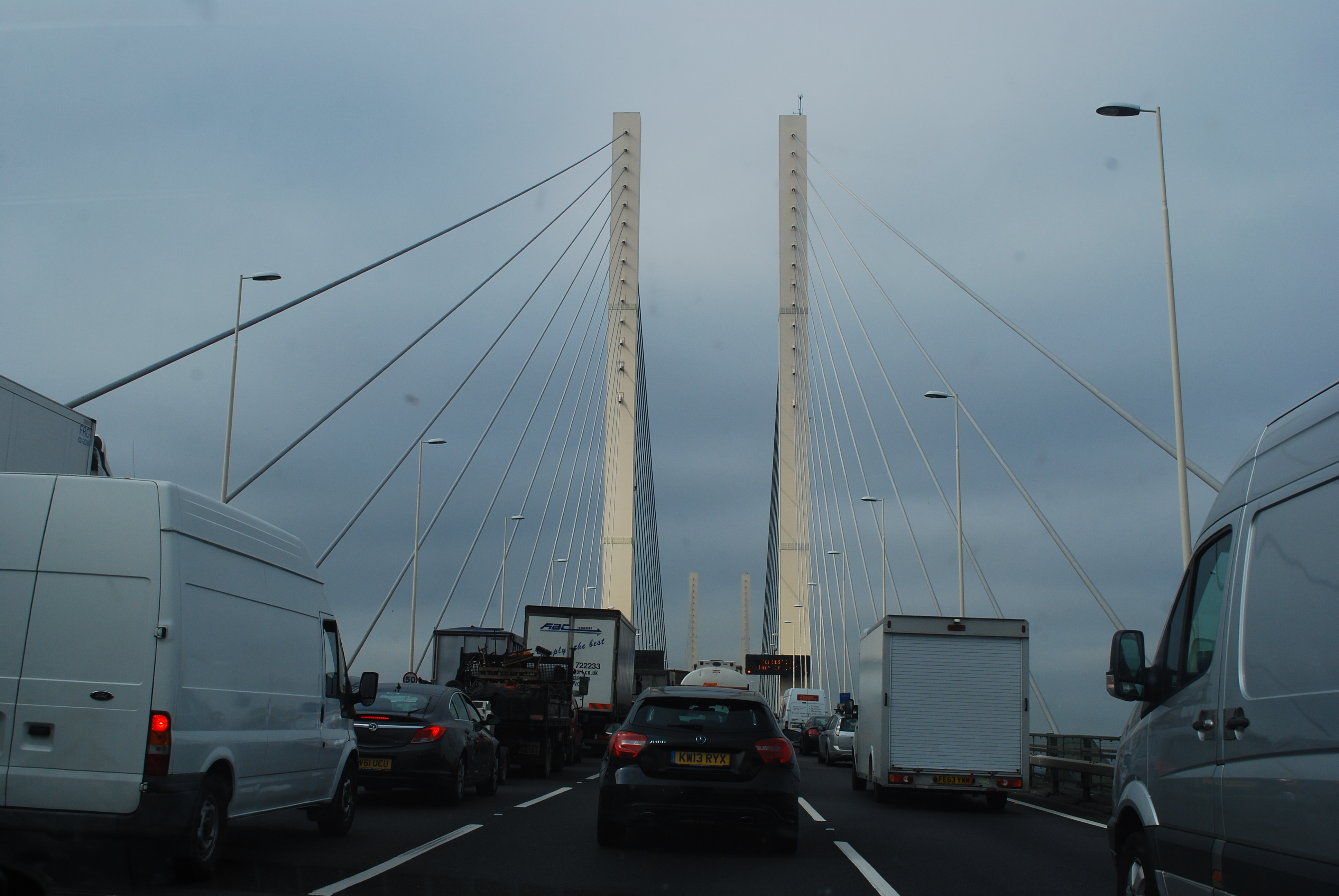 Dartford Crossing Londen